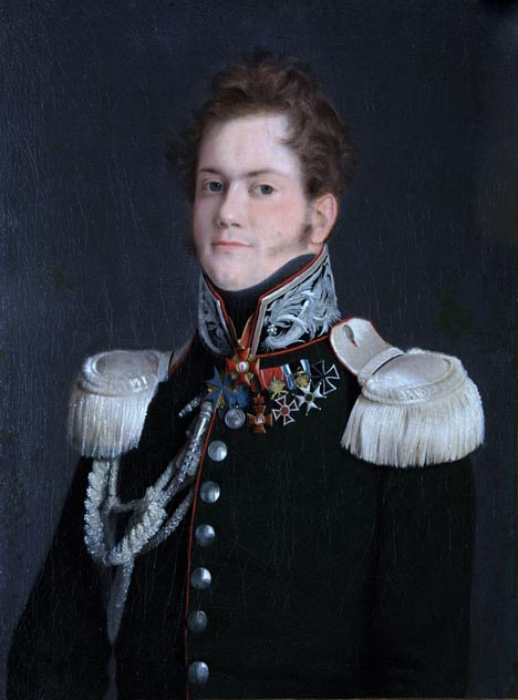 Александр Николаевич Муравьёв (1792 —- 1863) — российский государственный деятель, военачальник, один из основателей декабристского движения.